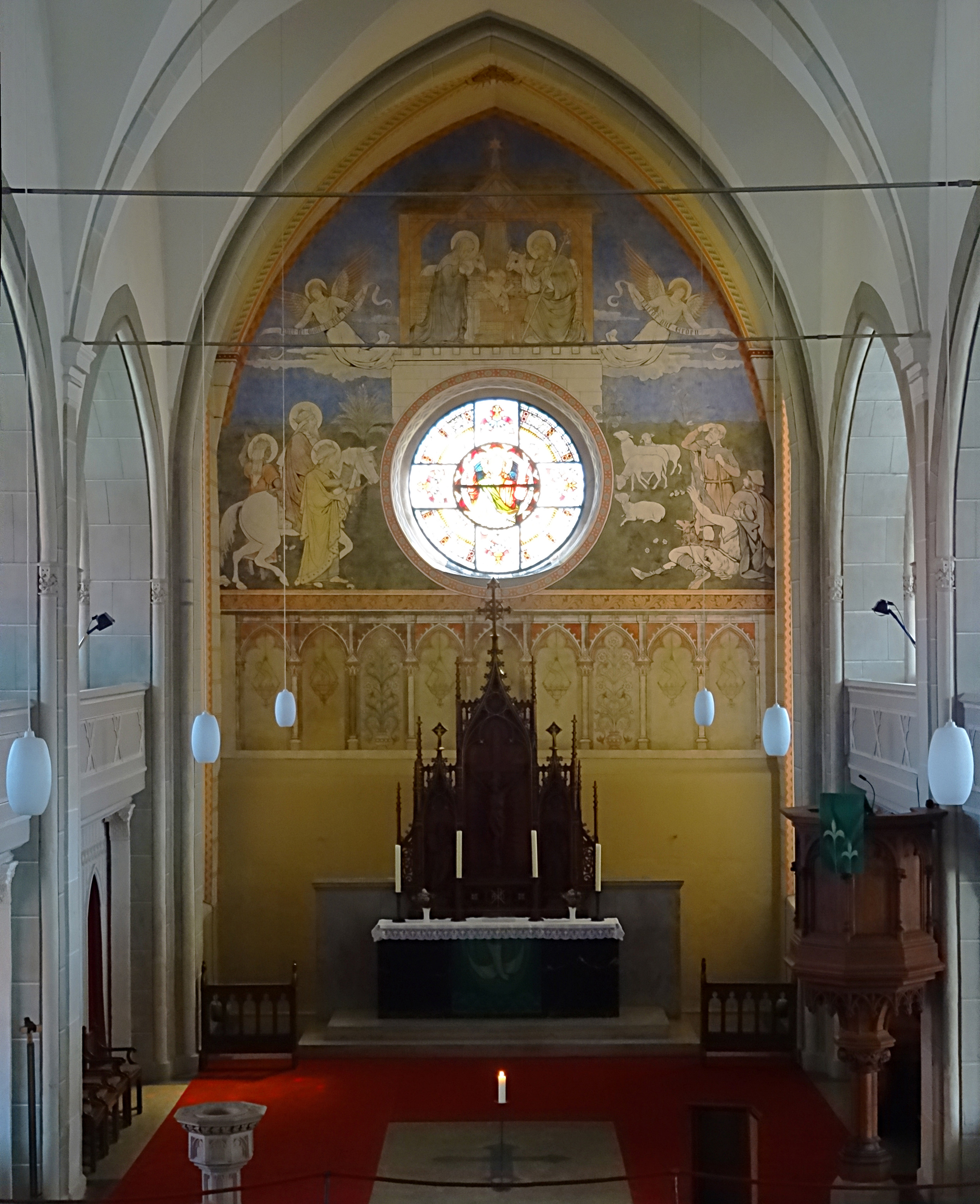 St.-Antonius-Kirche Hasselfelde, Altarraum mit Wandbild von Adolf Quensen (1902)